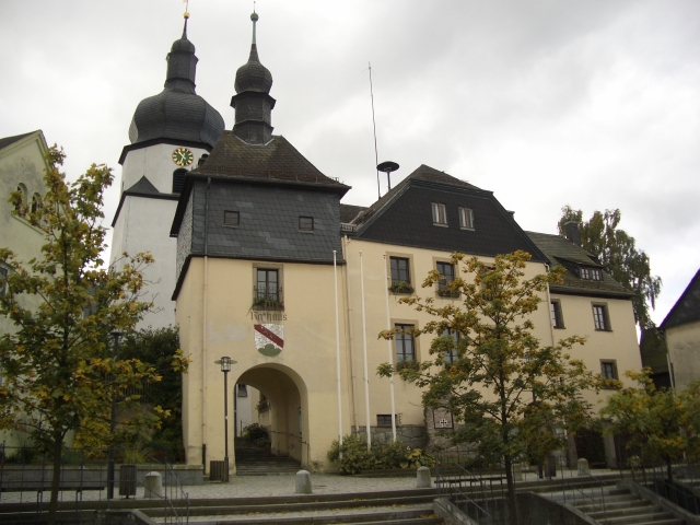 Berg (Oberfranken) Rathaus mit Jakobuskirche selbst aufgenommen im September 2007 Autor Vodeg